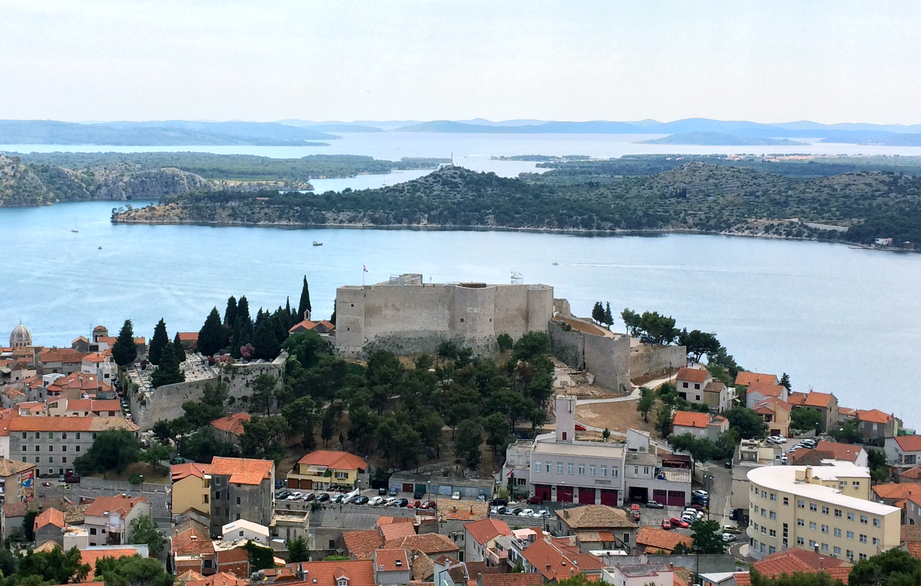 Srpskohrvatski / српскохрватски: Pogled na tvrđavu svete Ane s tvrđave Tanaja u Šibeniku